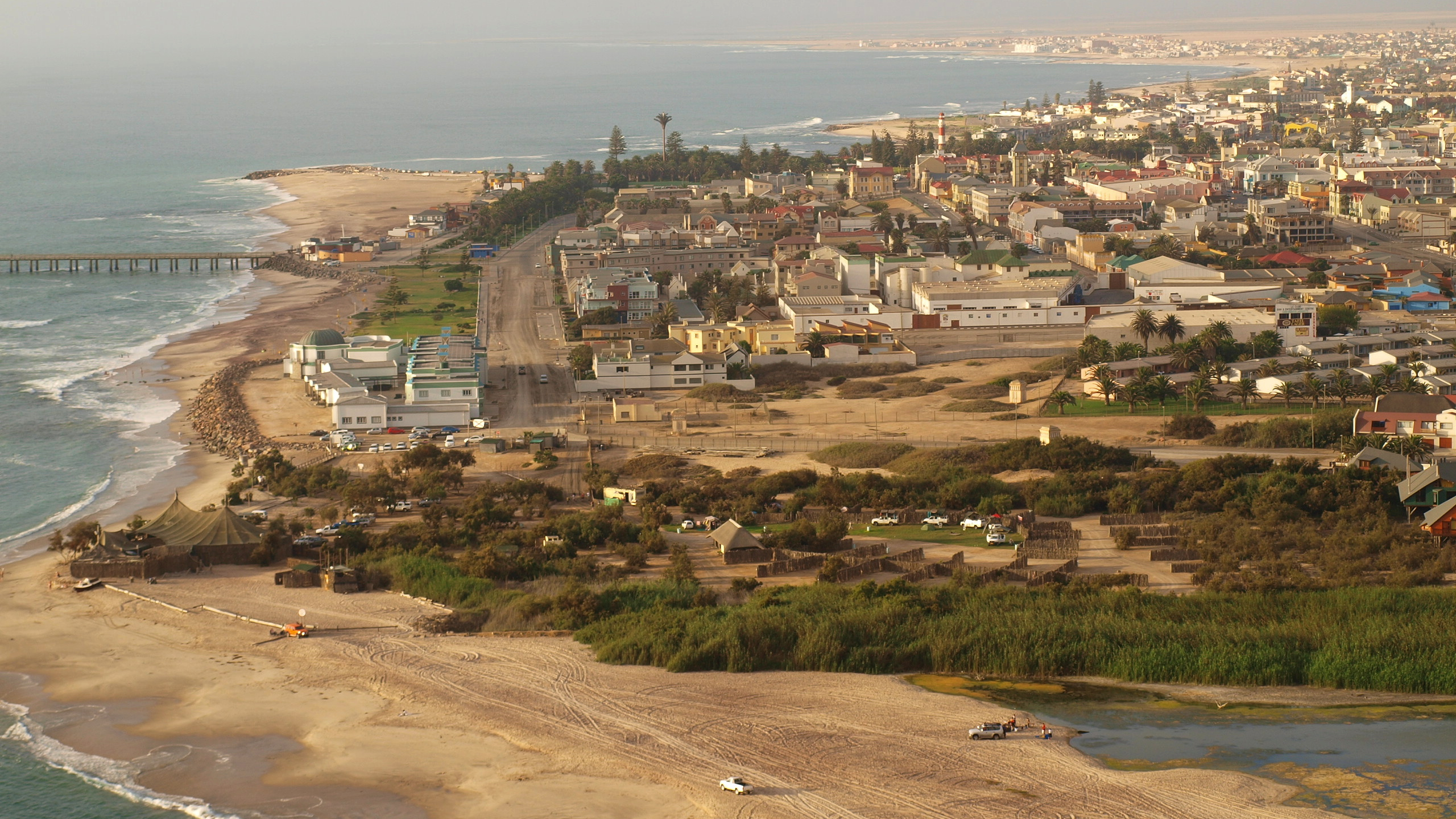 Swakopmund aus südlicher Richtung